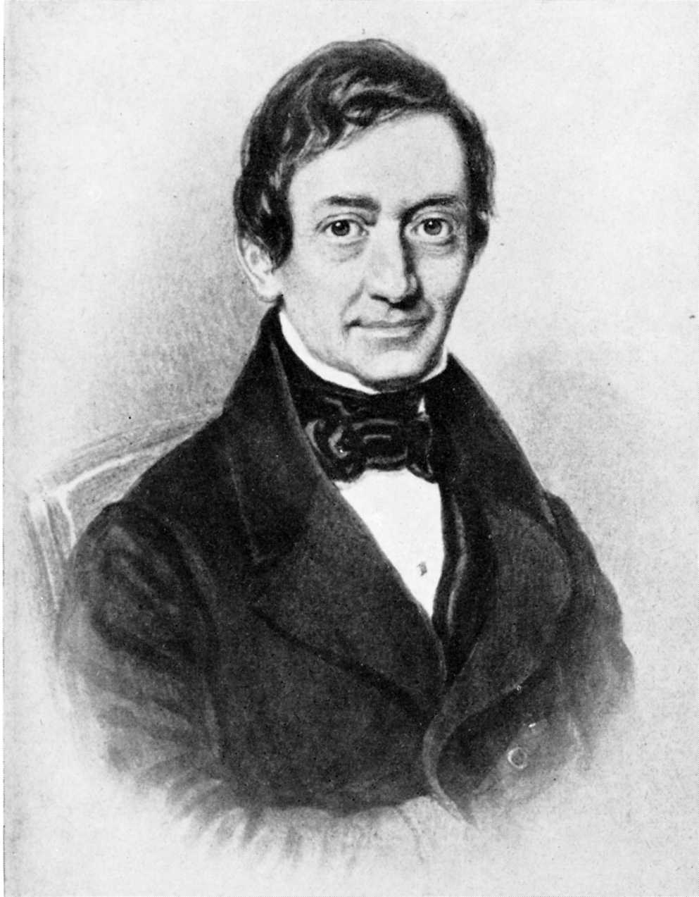 Aquarell von Philipp Gomperz (1782–1857), österreichischer Bankier